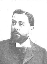 Julio Burell. Fotografía de Manuel Compañy.